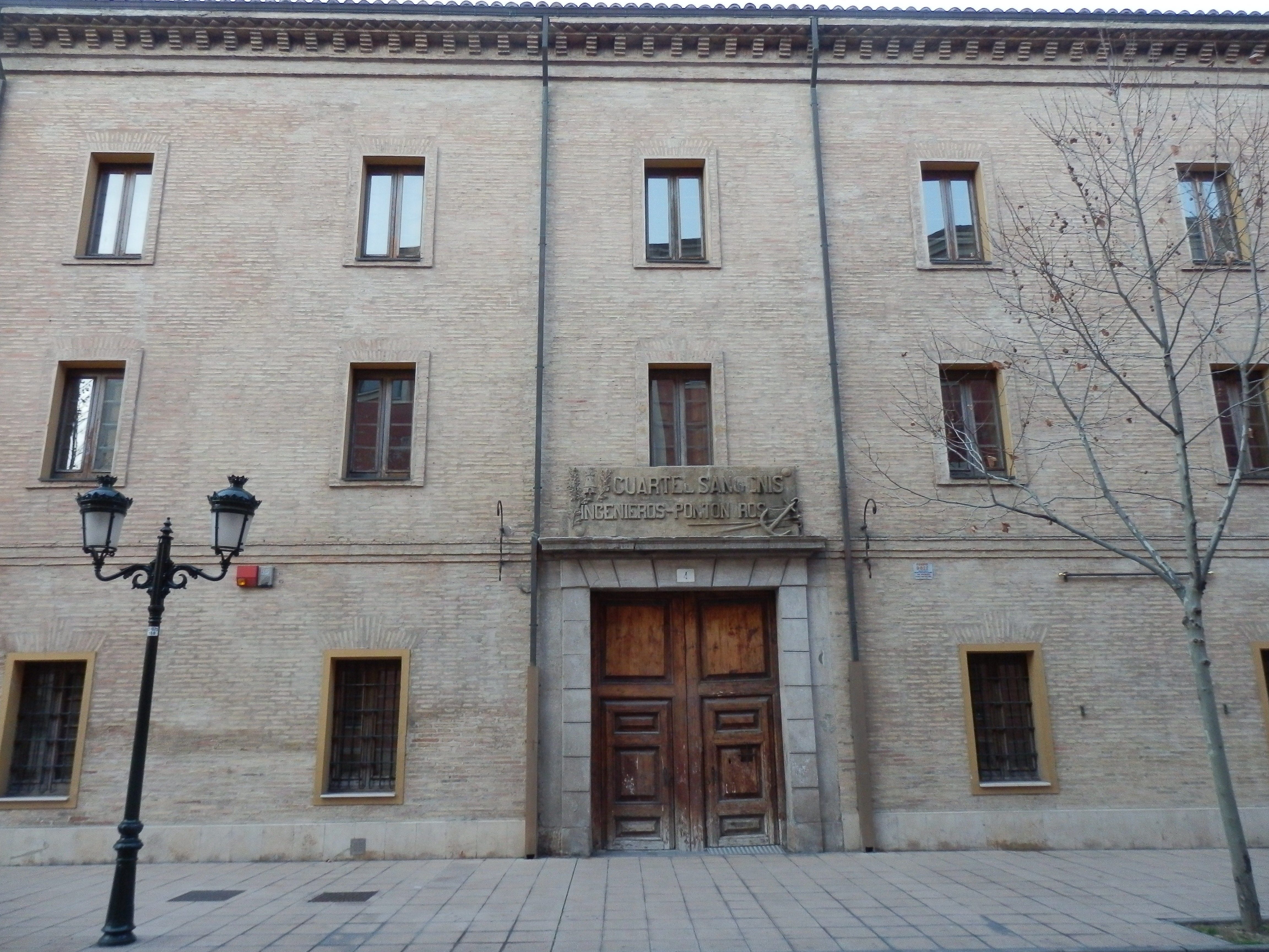 Antiguo Cuartel de Pontoneros Sangenis de Zaragoza. Situado en la calle Madre Rafols, 4.